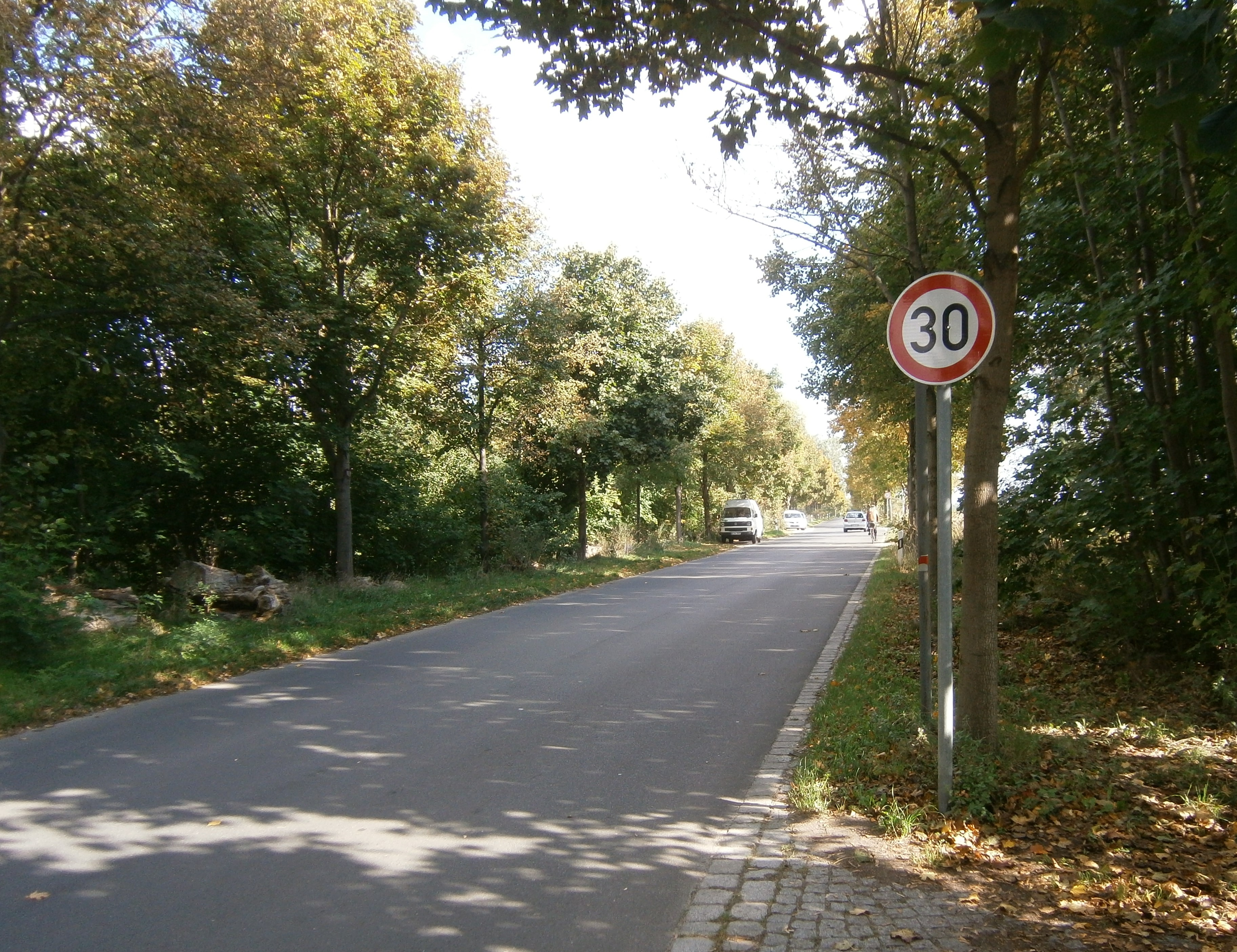 Die Bahnhofstraße ist eine Straße in Berlin-Blankenfelde Lübars. Hier der Blick vom Ortsteileingang aus Lübars nach Ost.